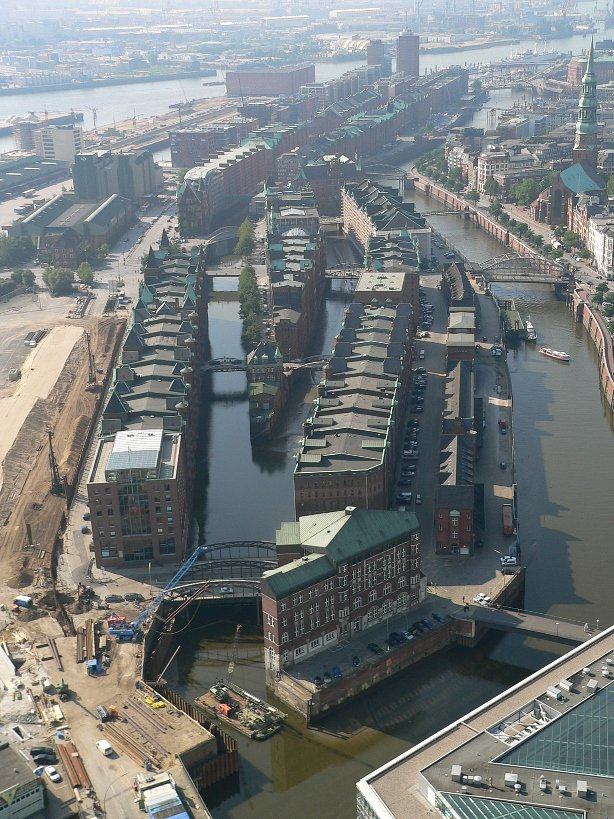 Speicherstadt in Hamburg, vom Highflyer aus gesehen (21.9.2005)This is a photograph of an architectural monument.